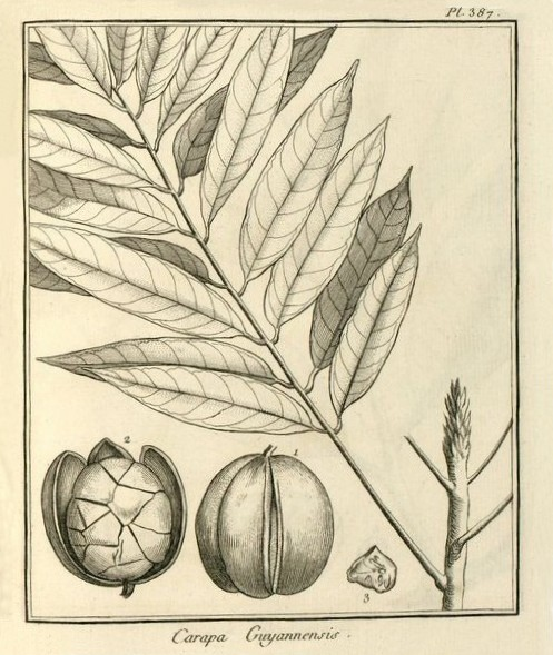 Fusée-Aublet, Jean-Baptiste-Christian (1775) Histoire des plantes de la Guiane françoise. chez Pierre-François Didot jeune : Planche 387 tome IV, le carapa guyanensis